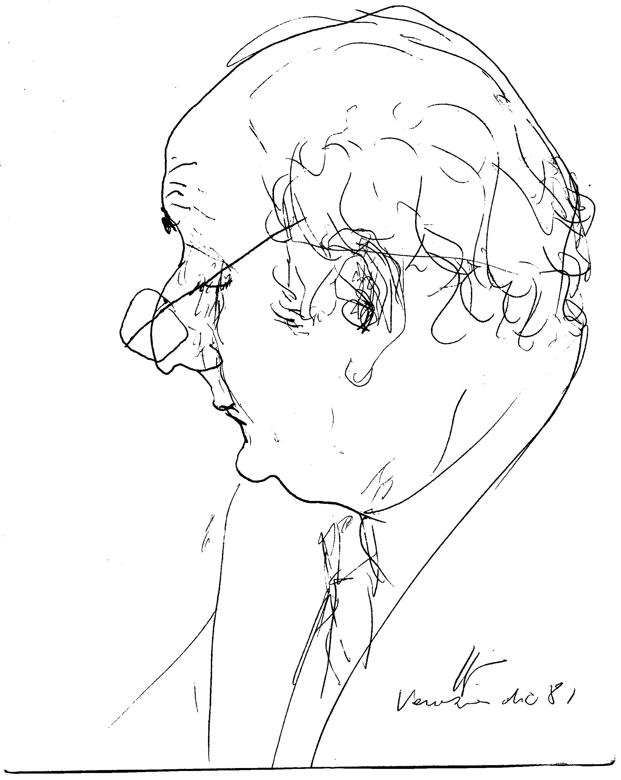 Gianni Milner, ritratto di Gianluigi Polidoro